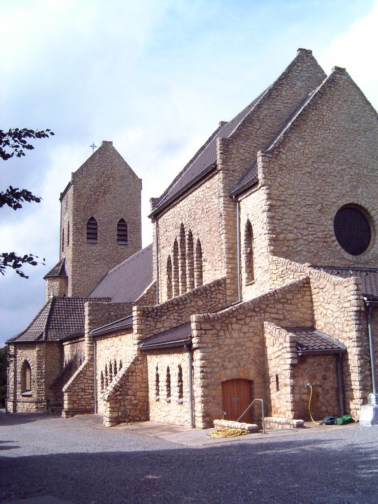 Limburgs: Kèrk van Ranzel